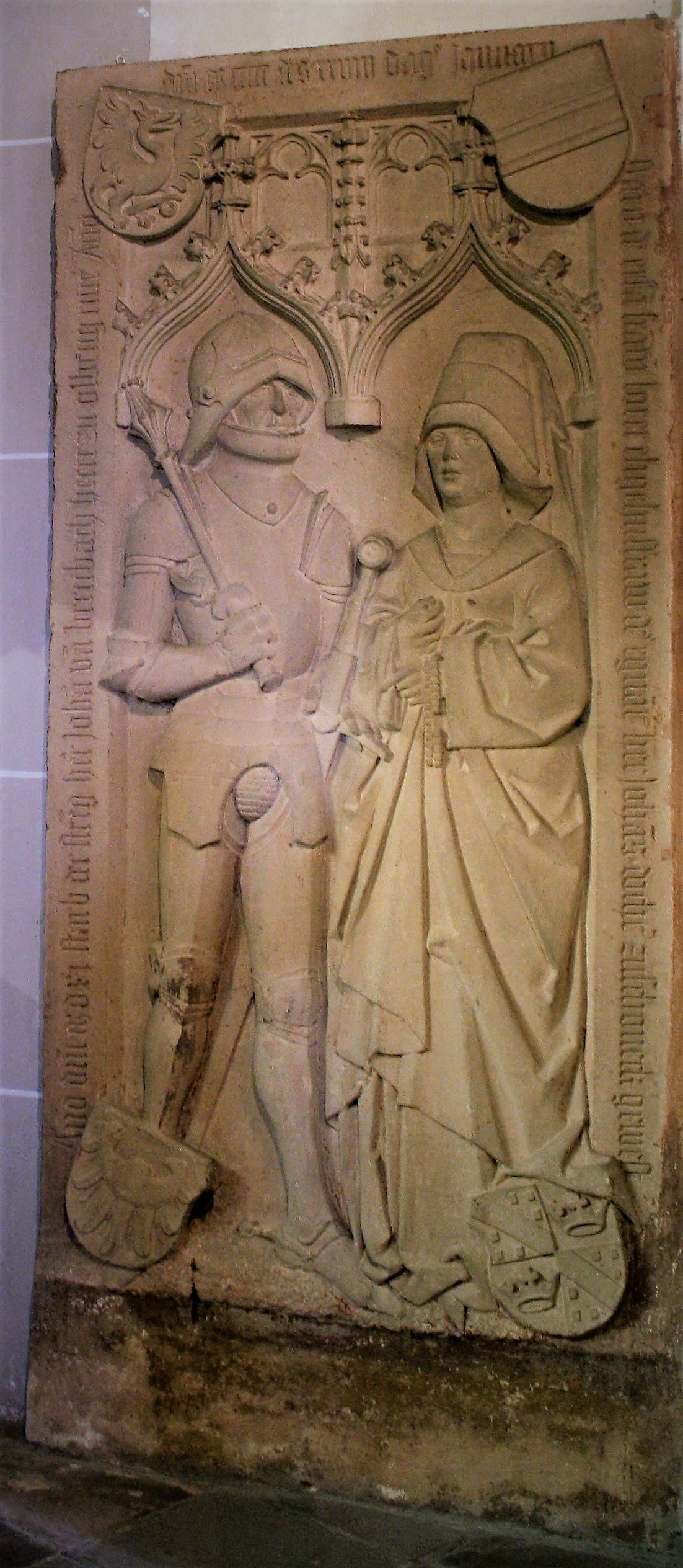 Epitaph: Johann v. Breidbach u. Loretta v. Schöneck in der Pfarrkirche St. Martin in Lorch im Rheingau aus rotem Sandstein. Inschrift: An(n)o d(omini) - starb der stre(n)g he(r)r loha(nn) va(n) breitbach herre zu olbrug ritte(r) An(n)o / d(omi)ni m ccccc des xxviii dags lanuarii / starb de ersa(m) fraw loret elige husfraw des egna(n)t(en) her Ioha(n)s · docht(er) zu schoneck gewest Wappen: oben optisch links, Breidbach von Bürresheim, rechts, von Schöneck ; unten optisch links Sooneck (Saneck) von Waldeck, rechts von Eynenburg[1] [2] ↑ ↑